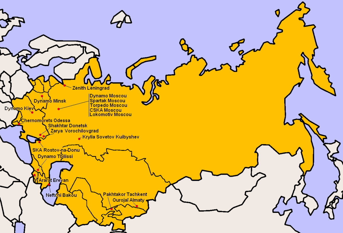 Clubs participants à la Division Supérieure 1979.